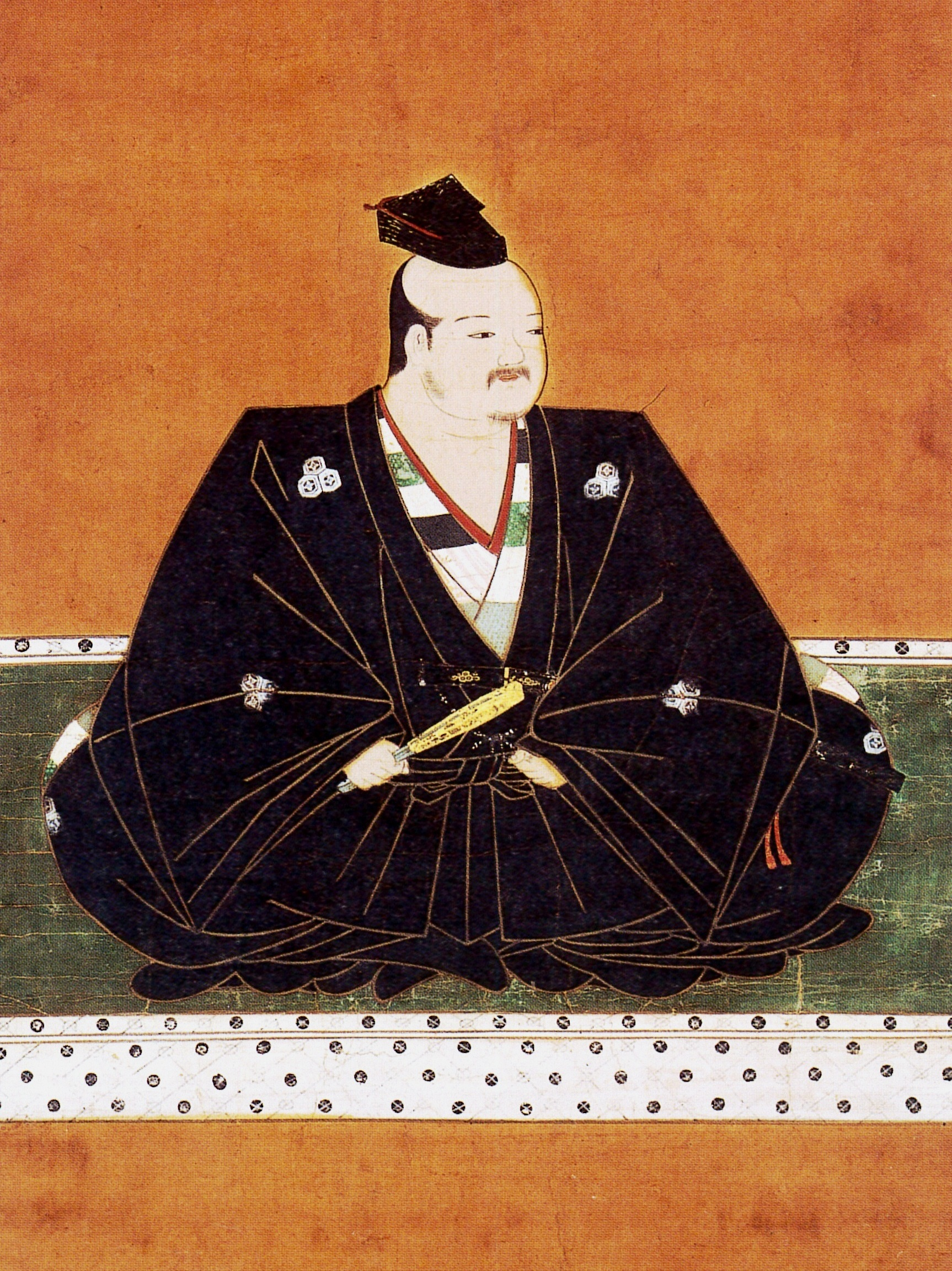 浅井長政（1545 - 1573）の肖像画（部分）